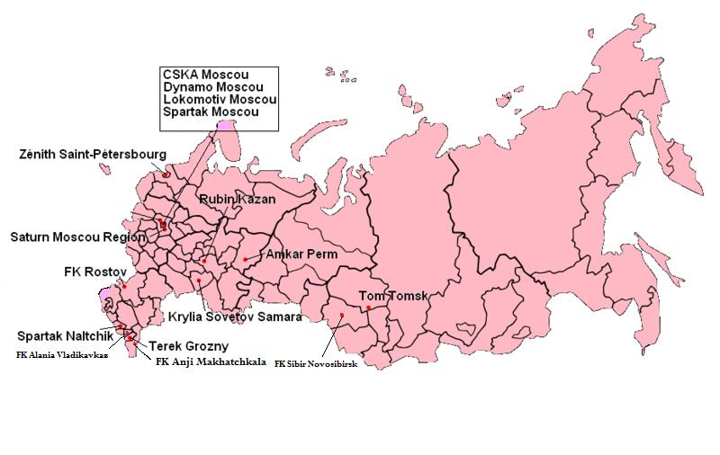 Description